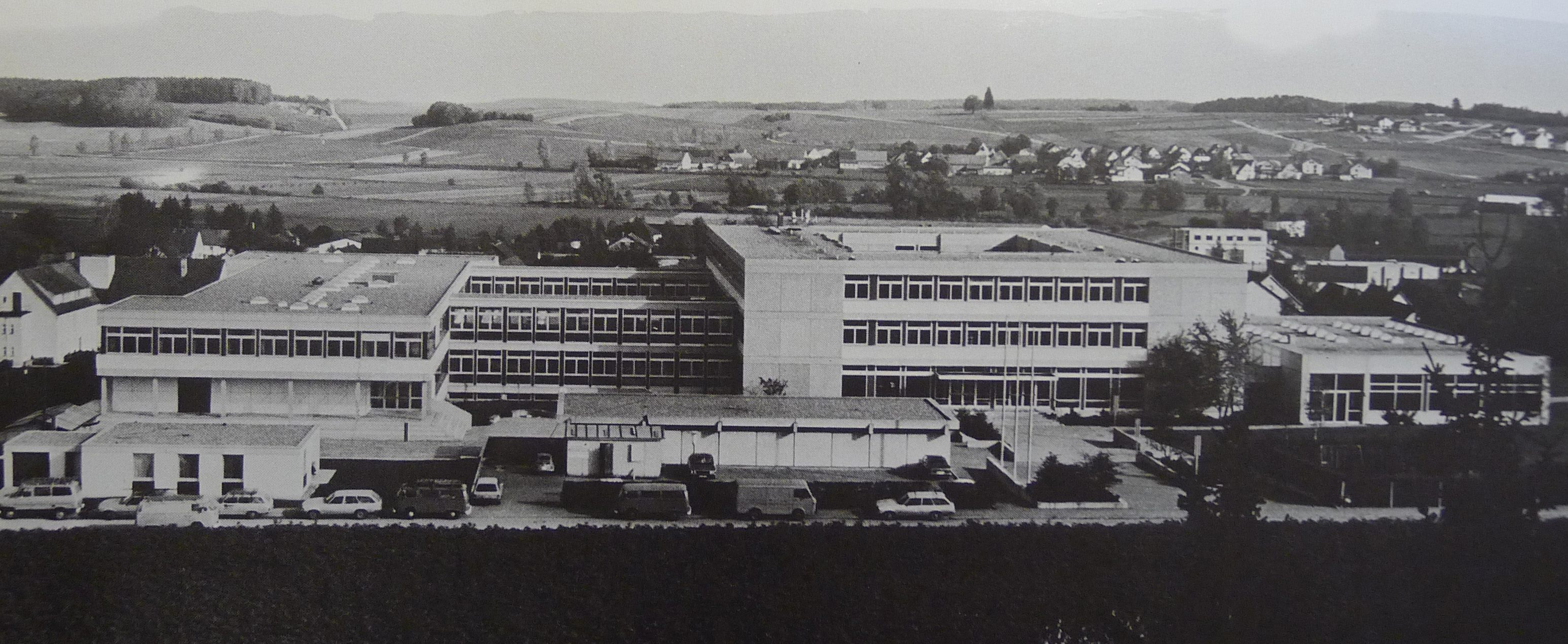 Frontansicht mit Hauptportal des Gymnasiums Wertingen um 1970